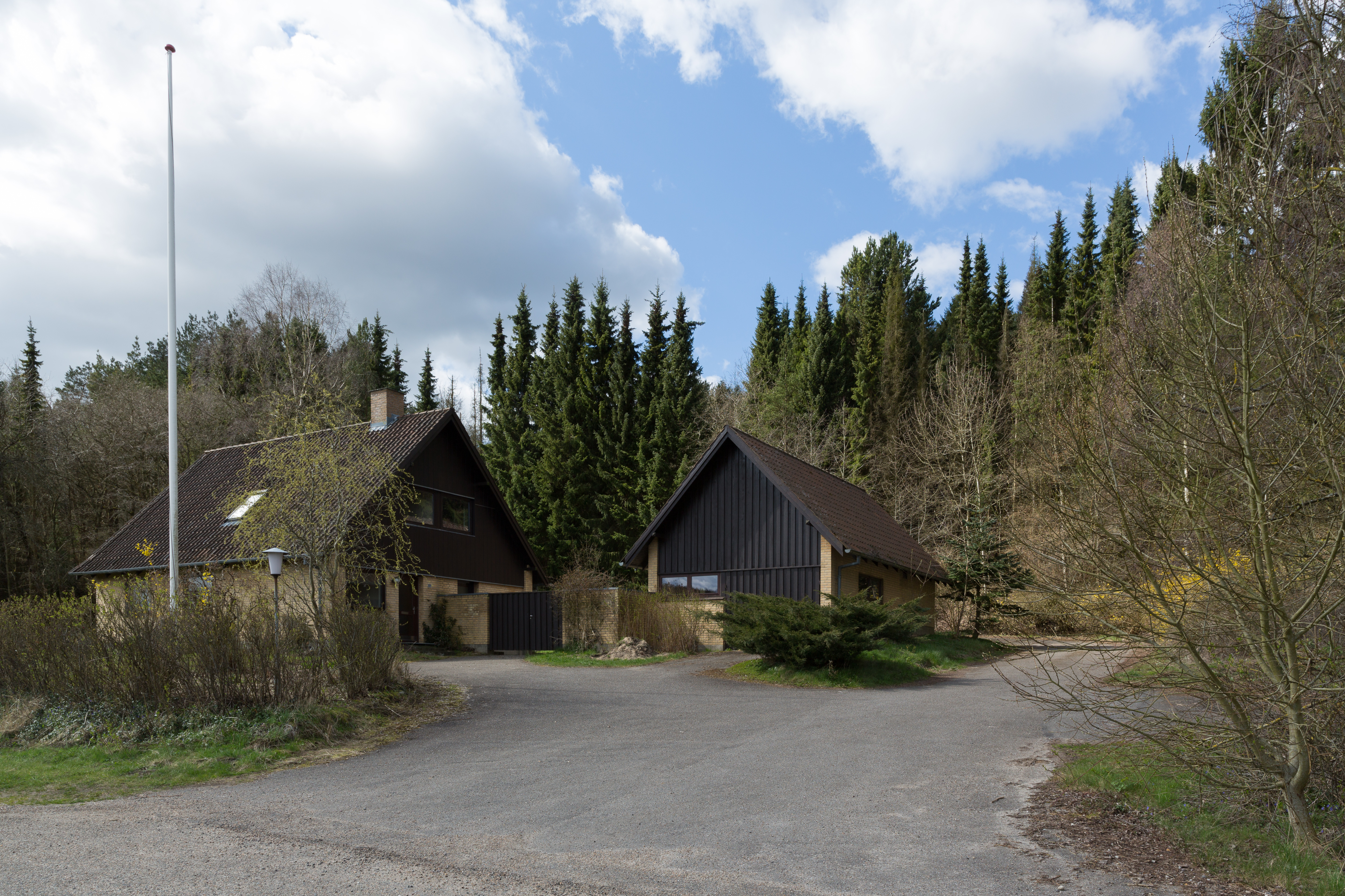 Driftmesterbolig til regan vest